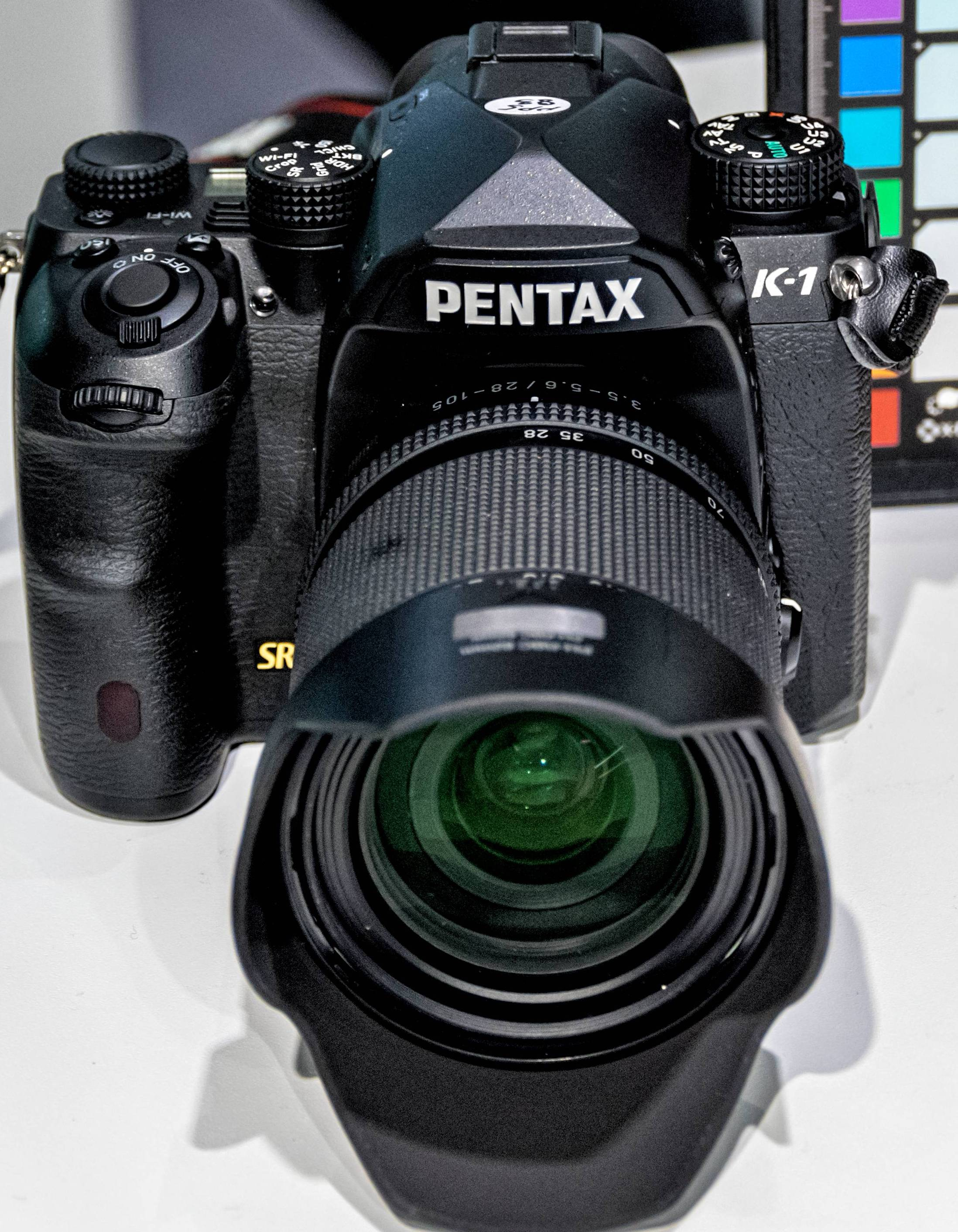 Die Kleinbildkamera Pentax K-1. Diese Kamera wurde am 16.03.2016 in Freiburg bei Ringfoto Löffler von Pentax vorgeführt. Es ist die endgültige Hardware, allerdings mit der Firmwareversion 0.48. Die Optik ist das neue 28-105 Zoom von Pentax Vielen Dank für die Photografiererlaubnis im Geschäft.